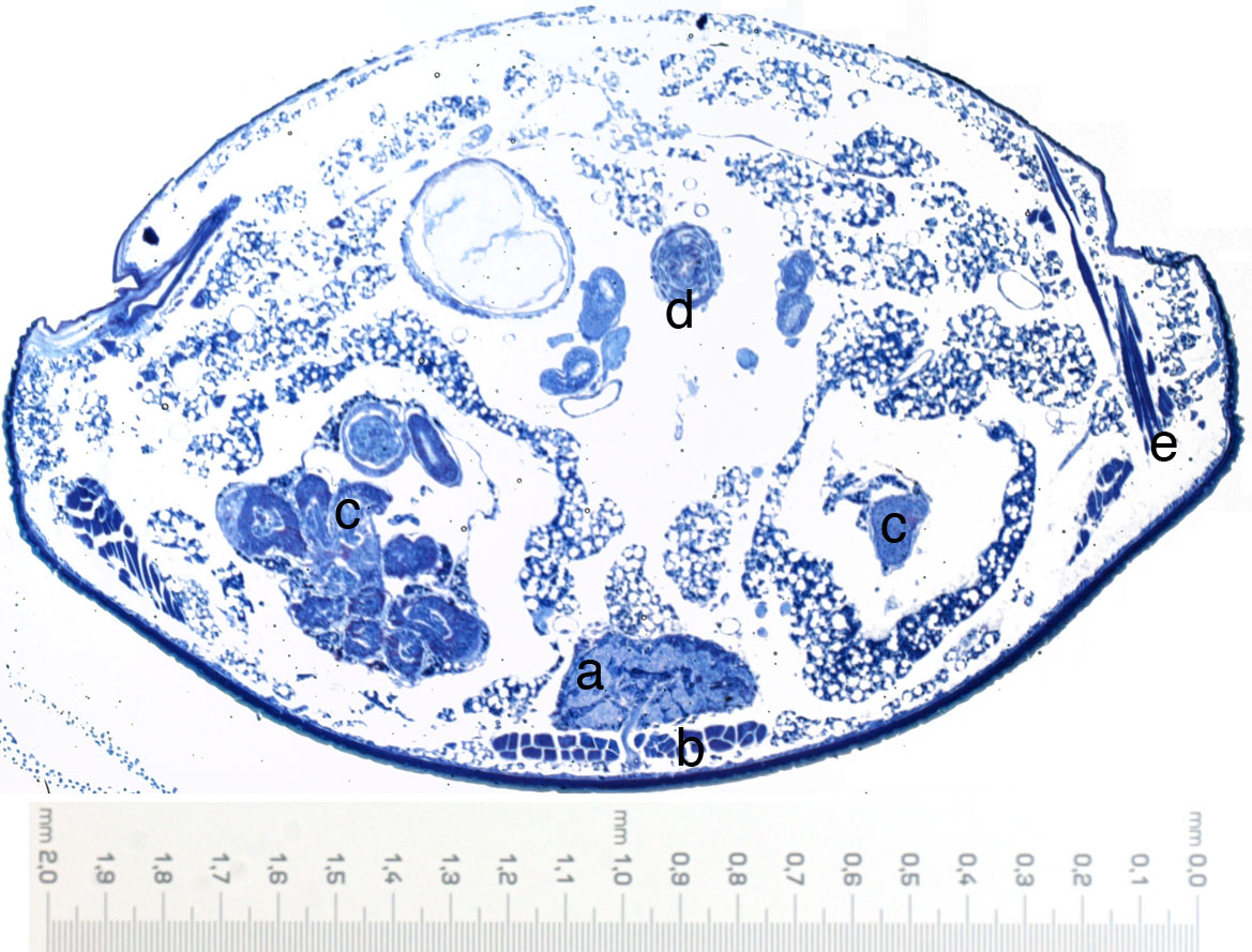 Histologischer Schnitt durch das Dornspeckkäferabdomen